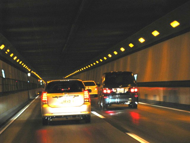 2009年5月5日、中央道上り笹子トンネル内で撮影